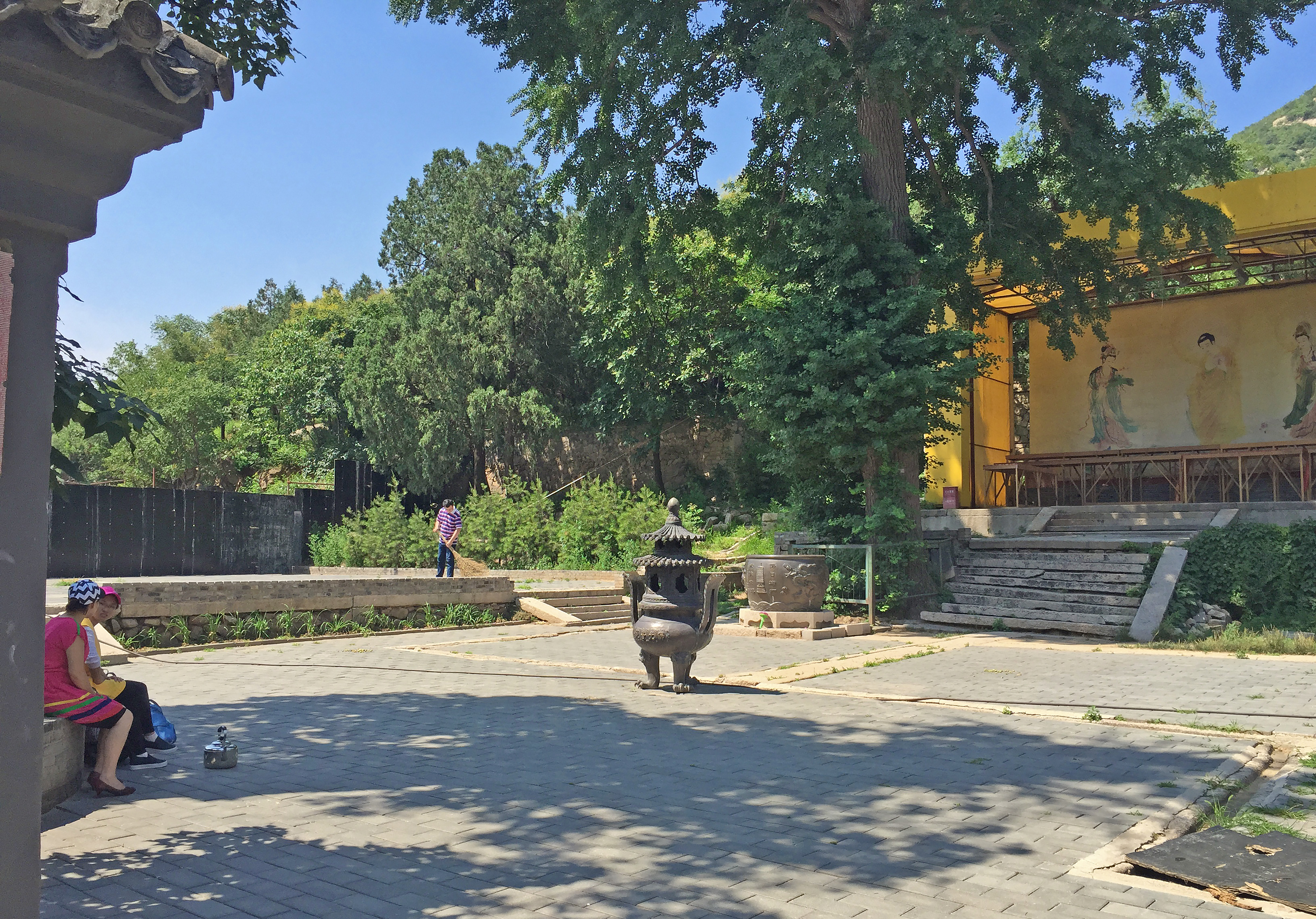 龙泉寺西院，可见辽朝创建的龙泉寺残留的青石基座